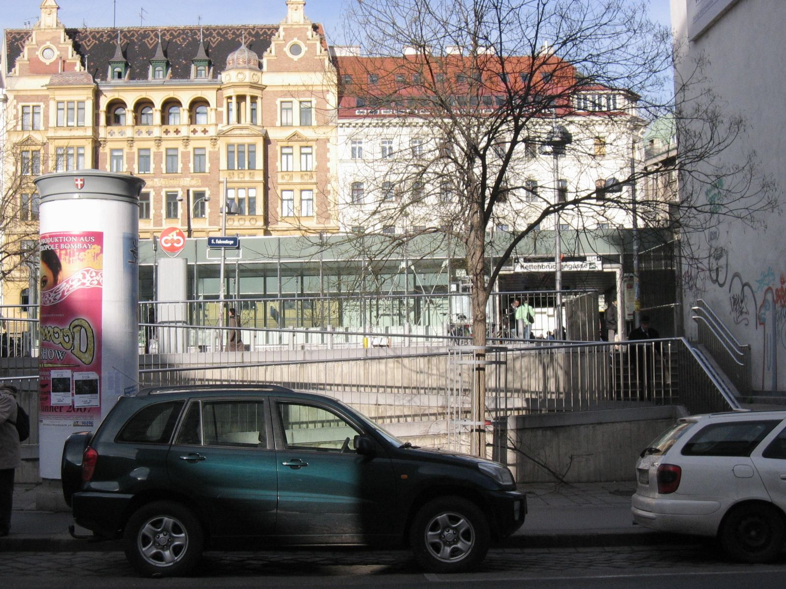 Falcostiege near U4 Kettenbrückengasse